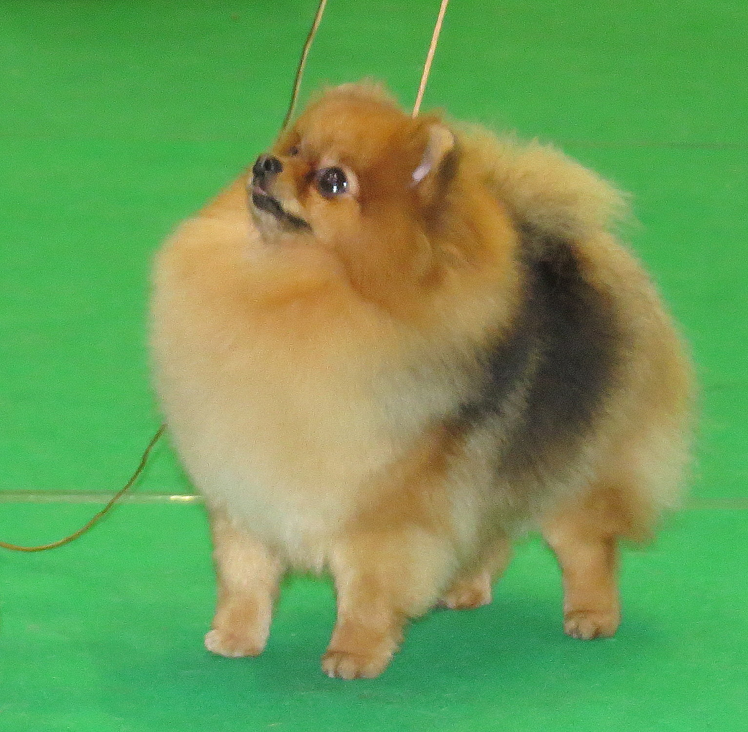 Померанский шпиц